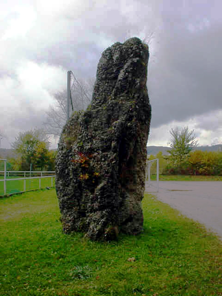 Menhir- Tiengen - Baden-Württemberg - Deutschland